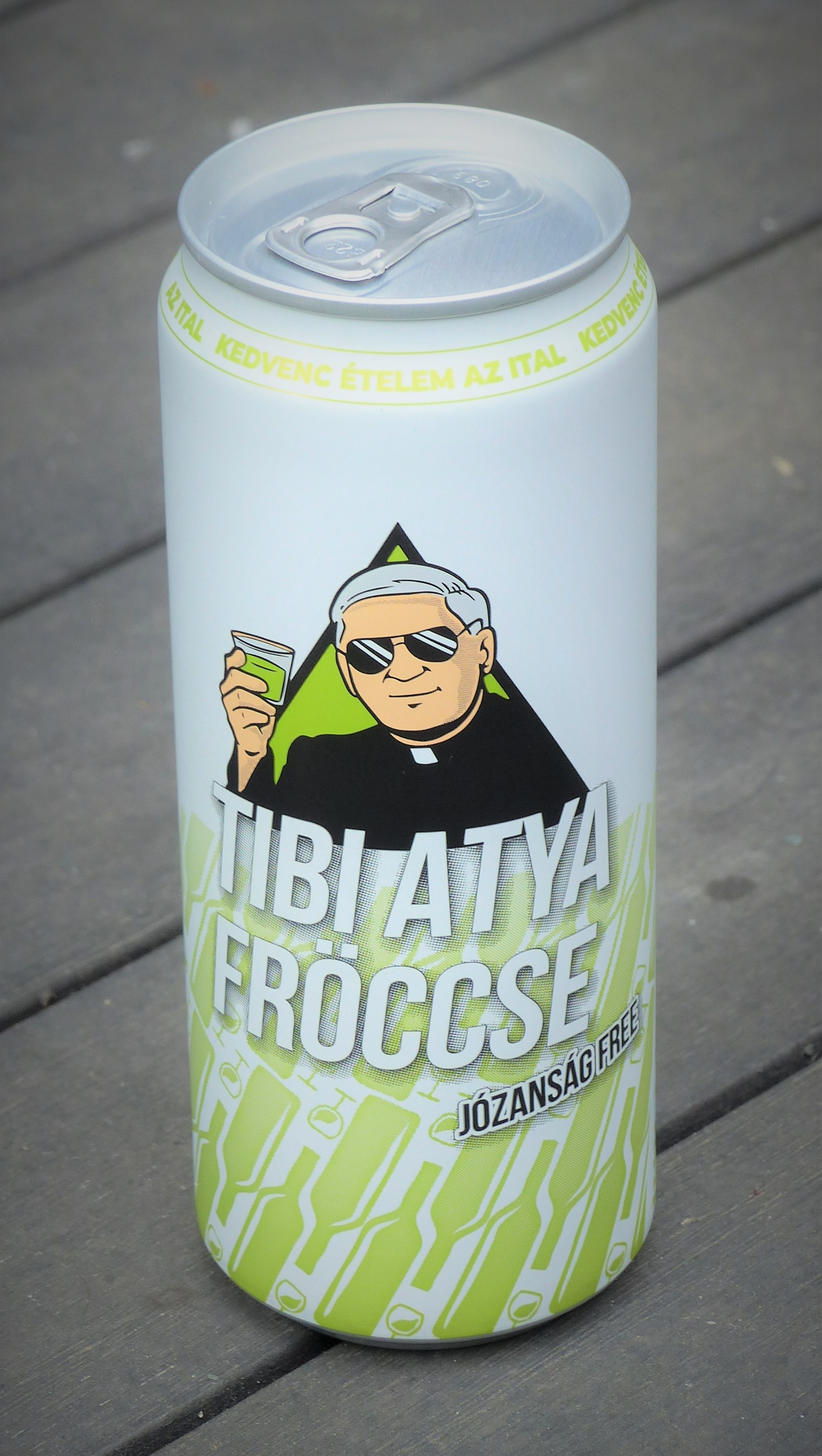 Tibi atya fröccse. A jogtulajdonos a felhasználást engedélyezte.